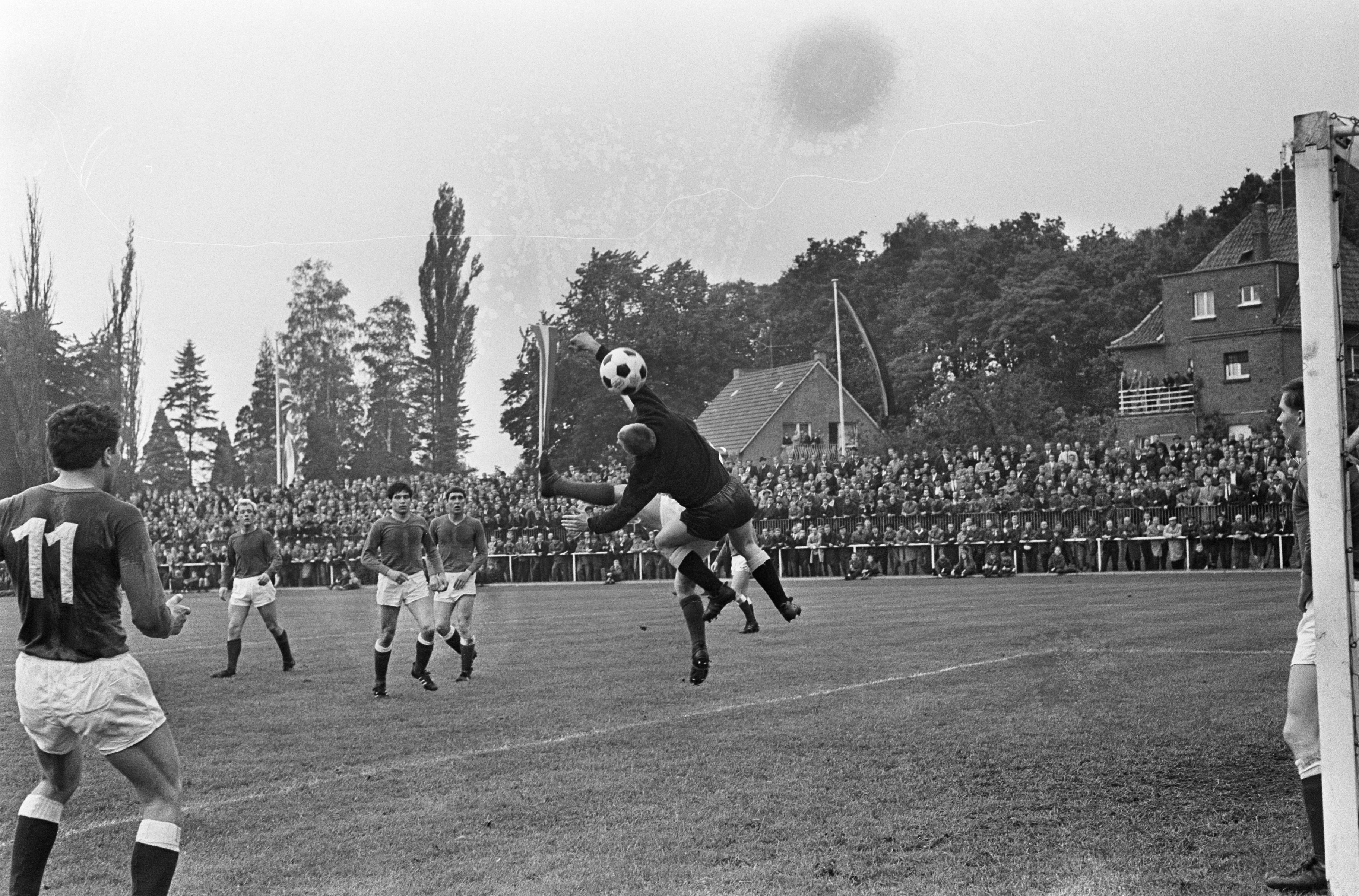 Collectie / Archief : Fotocollectie Anefo Reportage / Serie : [ onbekend ] Beschrijving : West Duitsland tegen Nederland (jeugd) te Emmerik, Kleijnjan in duel met Duitse keeper Datum : 9 juni 1965 Locatie : Emmerich, Emmerik Trefwoorden : duels, keepers, sport, voetbal Persoonsnaam : kleijnjan Fotograaf : Koch, Eric / Anefo Auteursrechthebbende : Nationaal Archief Materiaalsoort : Negatief (zwart/wit) Nummer archiefinventaris : bekijk toegang 2.24.01.05 Bestanddeelnummer : 917-8503